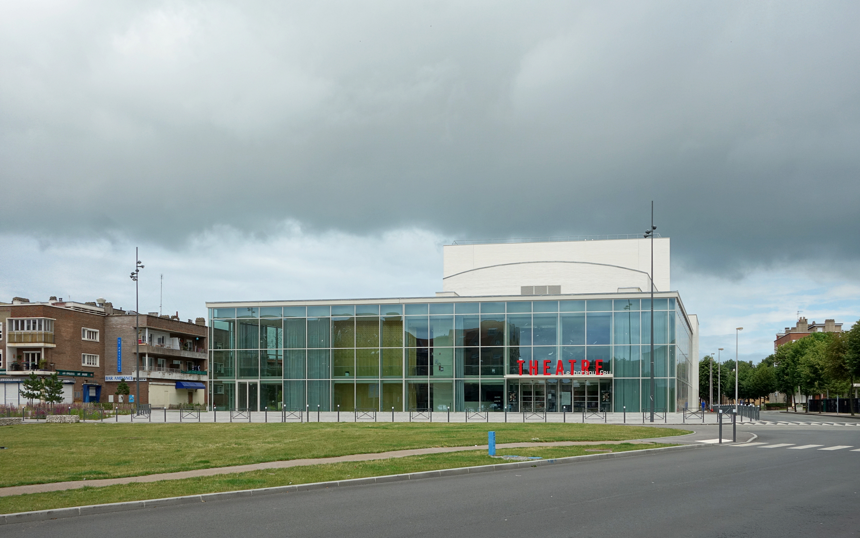 Théâtre le Bateau Feu à Dunkerque.